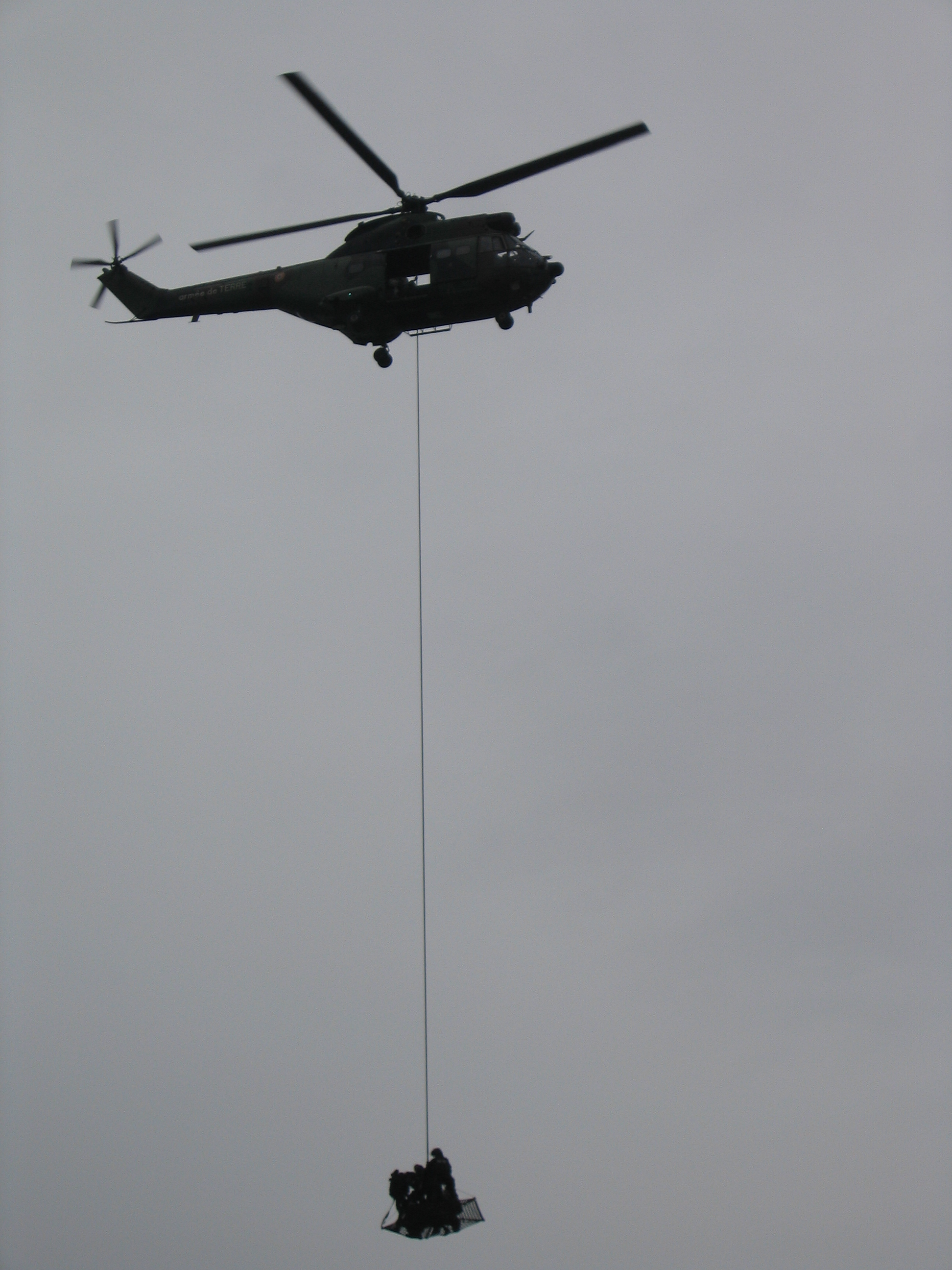 Démonstration d'hélitreuillage du GIGN lors des journées de sécurité intérieures 2009 sur l'esplanade des Invalides.